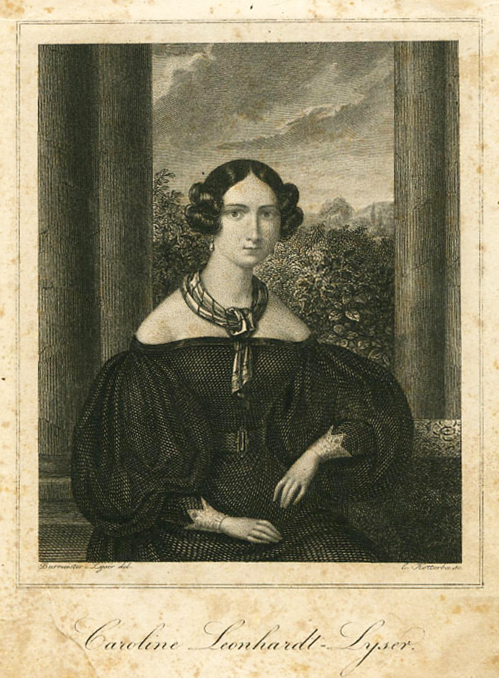 Caroline Leonhardt-Lyser, gezeichnet von ihrem Ehemann Johann Peter Lyser